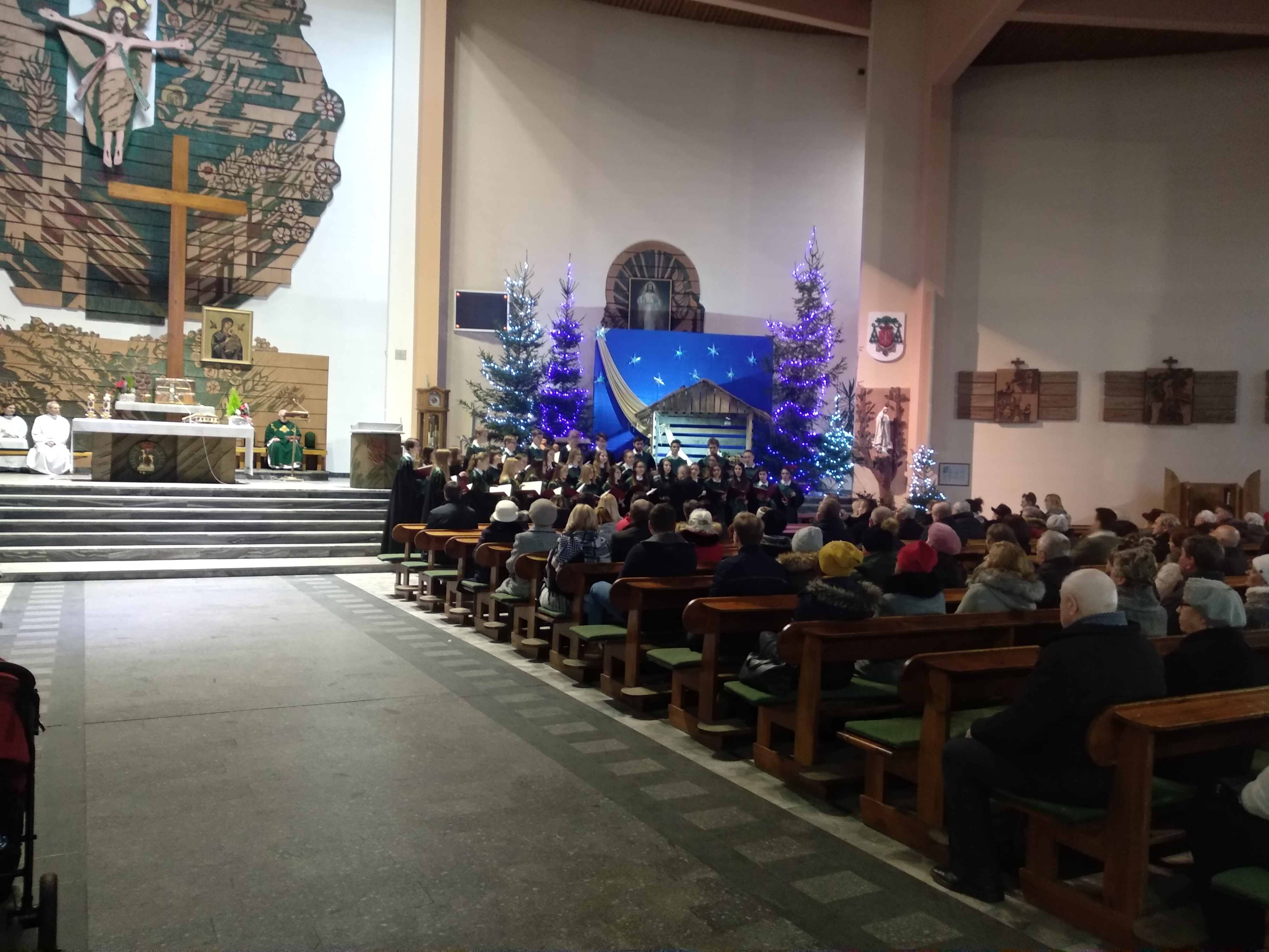 Chór Canto śpiewający kolędy. Parafia Najświętszego Zbawiciela we Włocławku (19 stycznia 2020 r.)